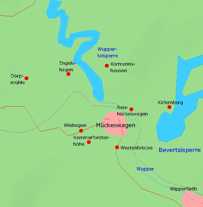 Karte von Hückeswagen und Umgebung, Kartenquelle: [1]